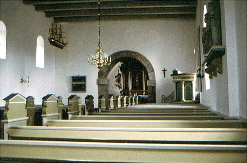 Mammen Kirke, (Viborg Kommune), Kirkerummet